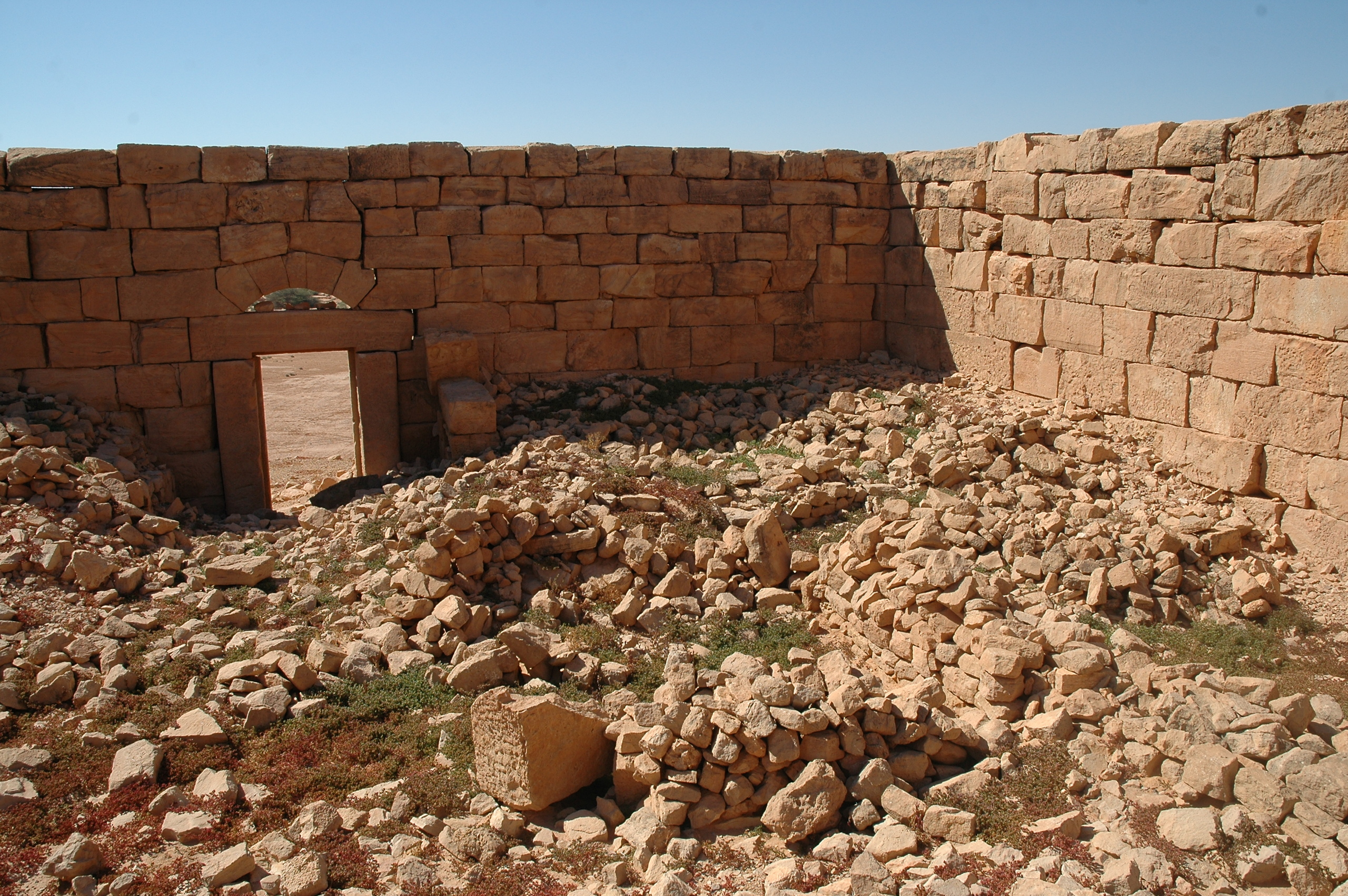 Das Kleinkastell Gasr Banat, auch Gasr Isawi, ist ein ehemaliges römisches Militärlager, dessen Besatzung für Sicherungs- und Überwachungsaufgaben am rückwärtigen Limes Tripolitanus in der römischen Provinz Africa proconsularis, später Tripolitania zuständig war. Blick im Inneren nach Süden zum einzigen Zugang.